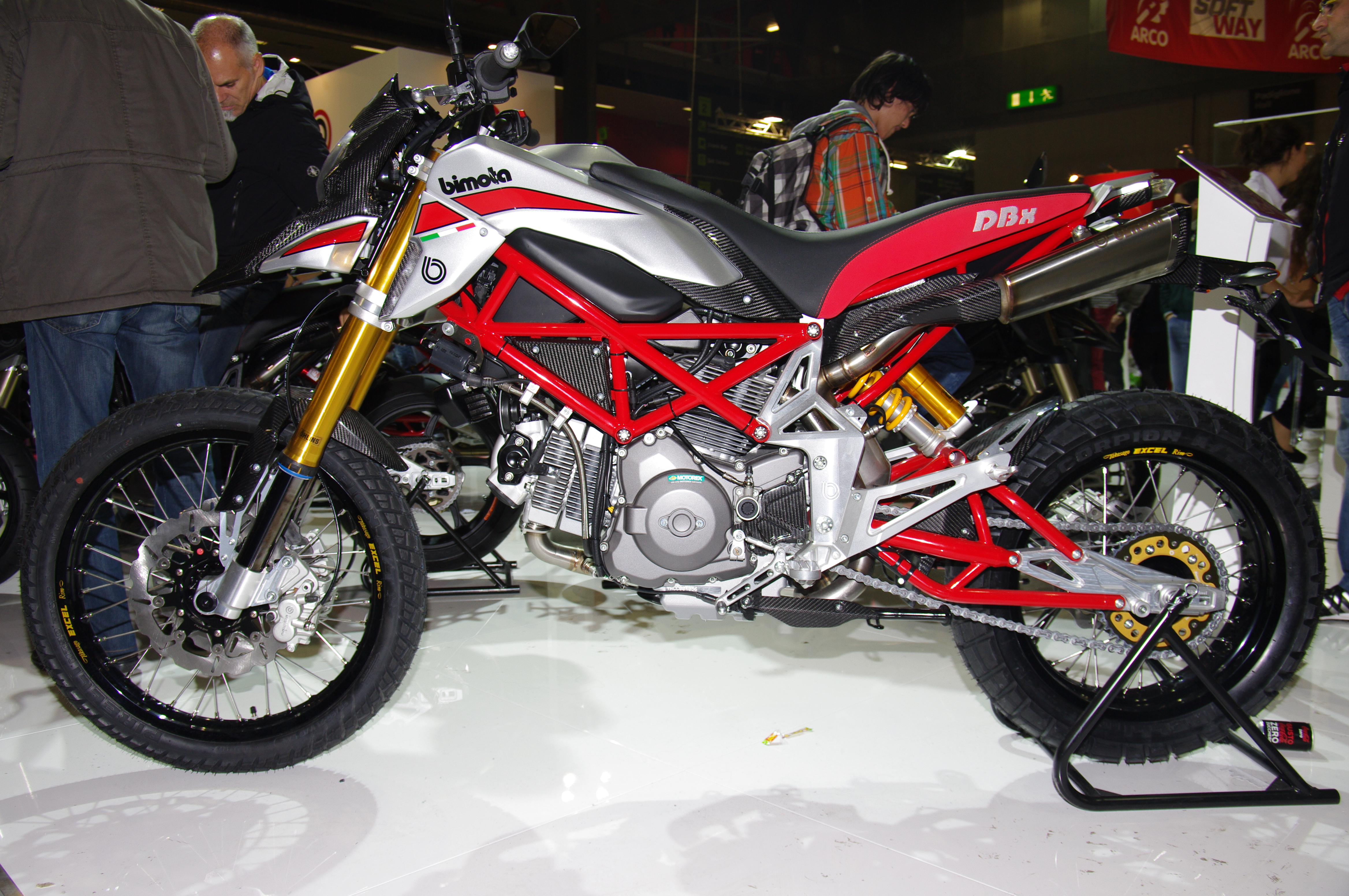 Bimota DBx sur le stand Bimota lors de l'EICMA 2012